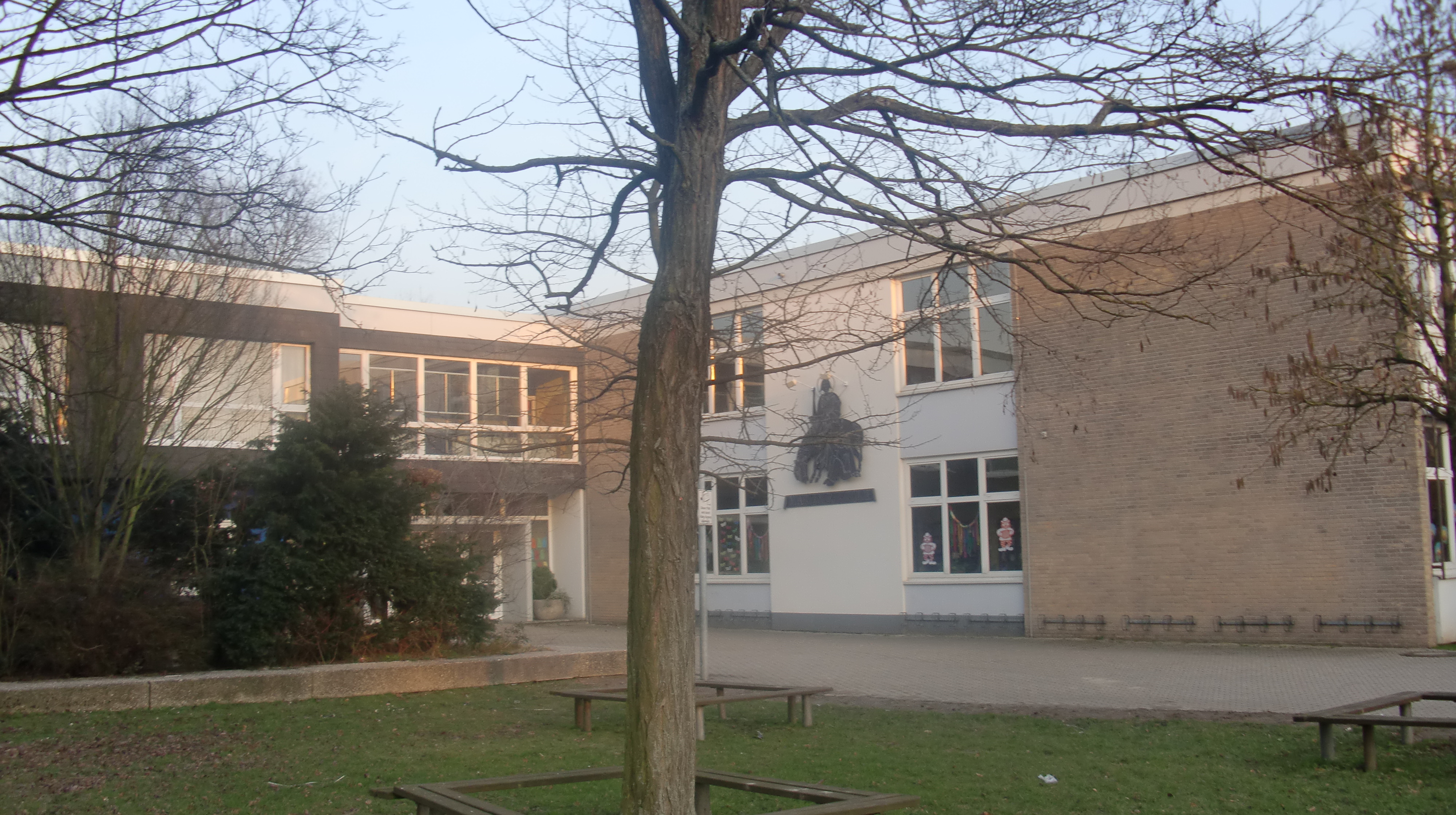 Die St. Martinusschule im Umsiedlungsort, gegenüber der Kirche.